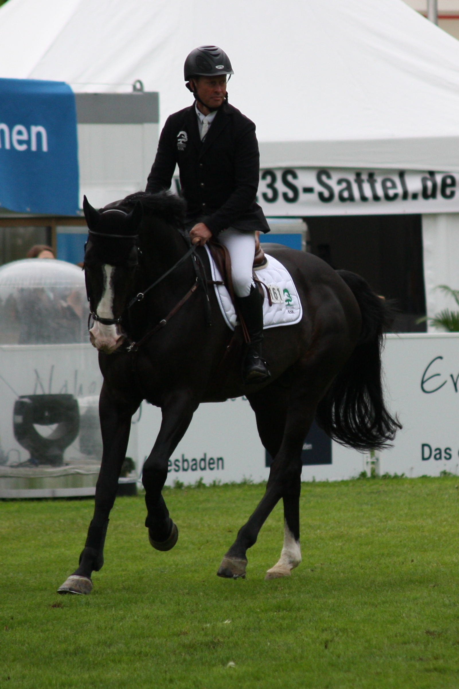 77. Internationanles Wiesbadener Pfingstunier 2013, CSI***** Eröffnungsspringen, Rolf-Göran Bengtsson auf Quintero ASK Personality rights warning Although this work is freely licensed or in the public domain, the person(s) shown may have rights that legally restrict certain re-uses unless those depicted consent to such uses. In these cases, a model release or other evidence of consent could protect you from infringement claims.